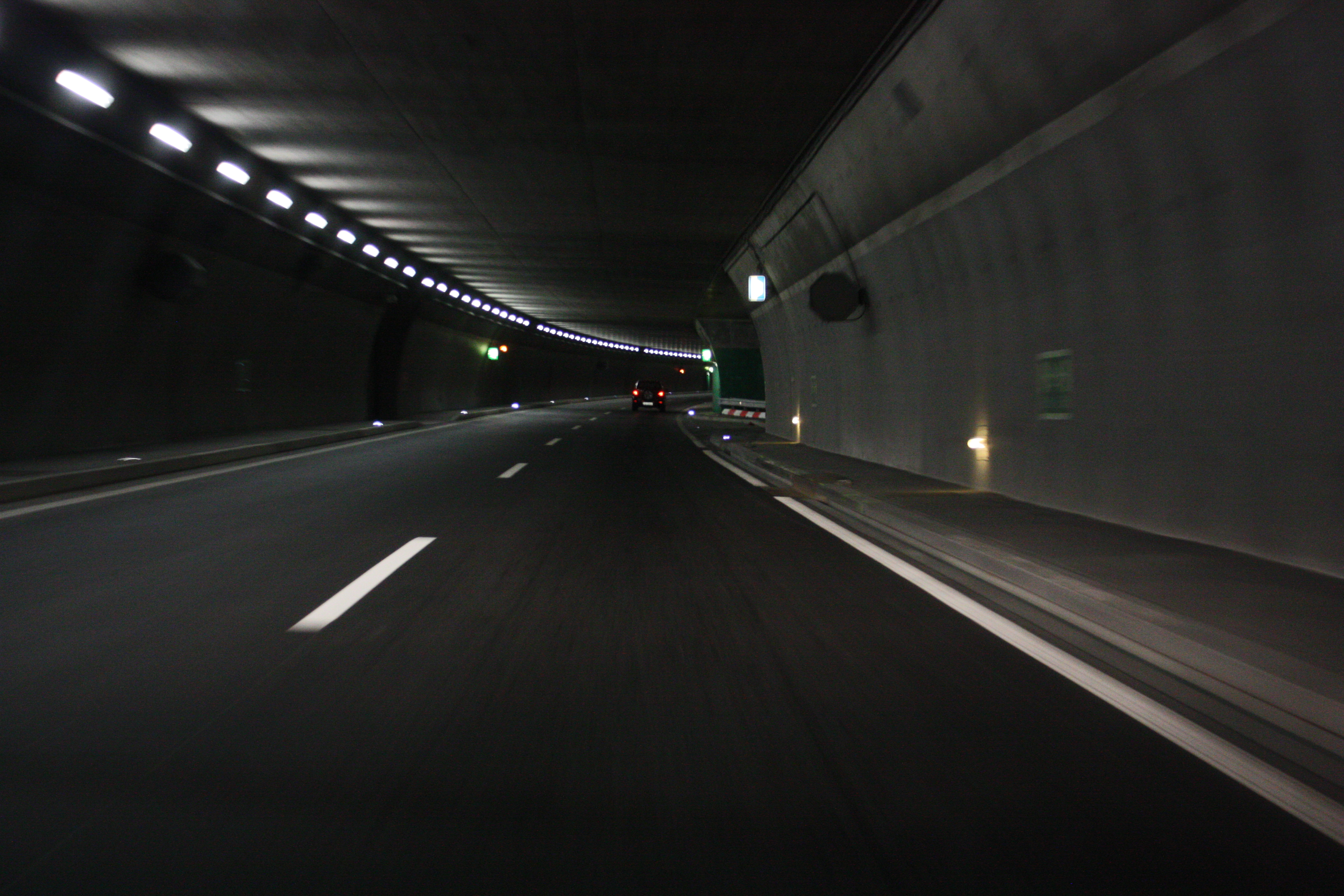 Le tunnel de Sierre au niveau de l'accident du 13 mars 2012. On aperçoit à droite la borne d’arrêt d'urgence et le mur frontal (en vert) dans lequel est entré en collision l'autobus.